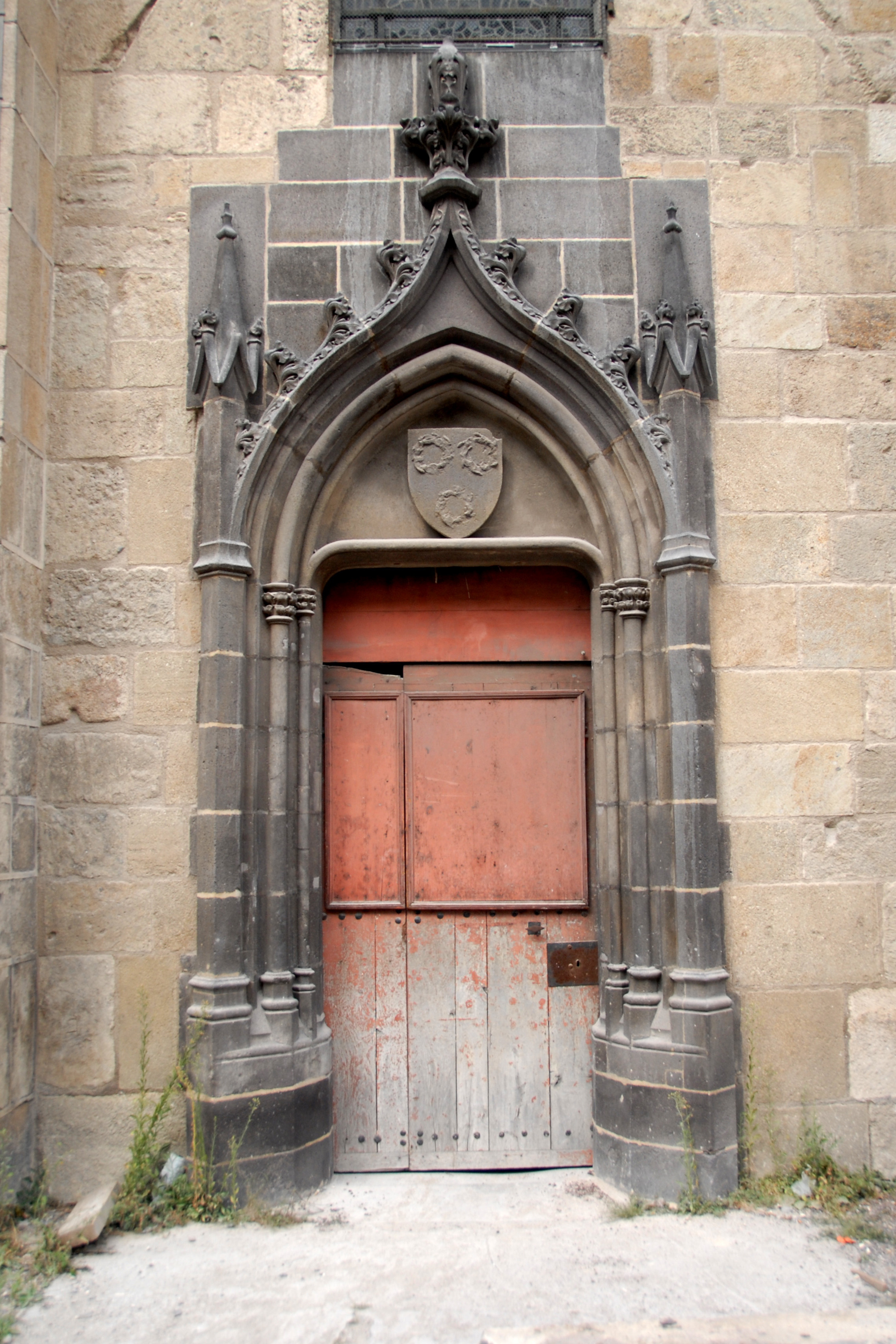 Notre-Dame du Port, goth. Südportal